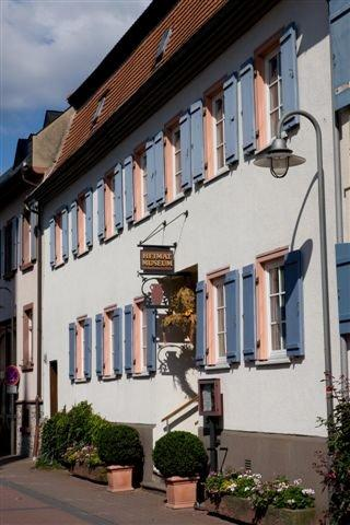 Das Bild zeigt die Frontansicht des Seulbergers Heimatmuseums